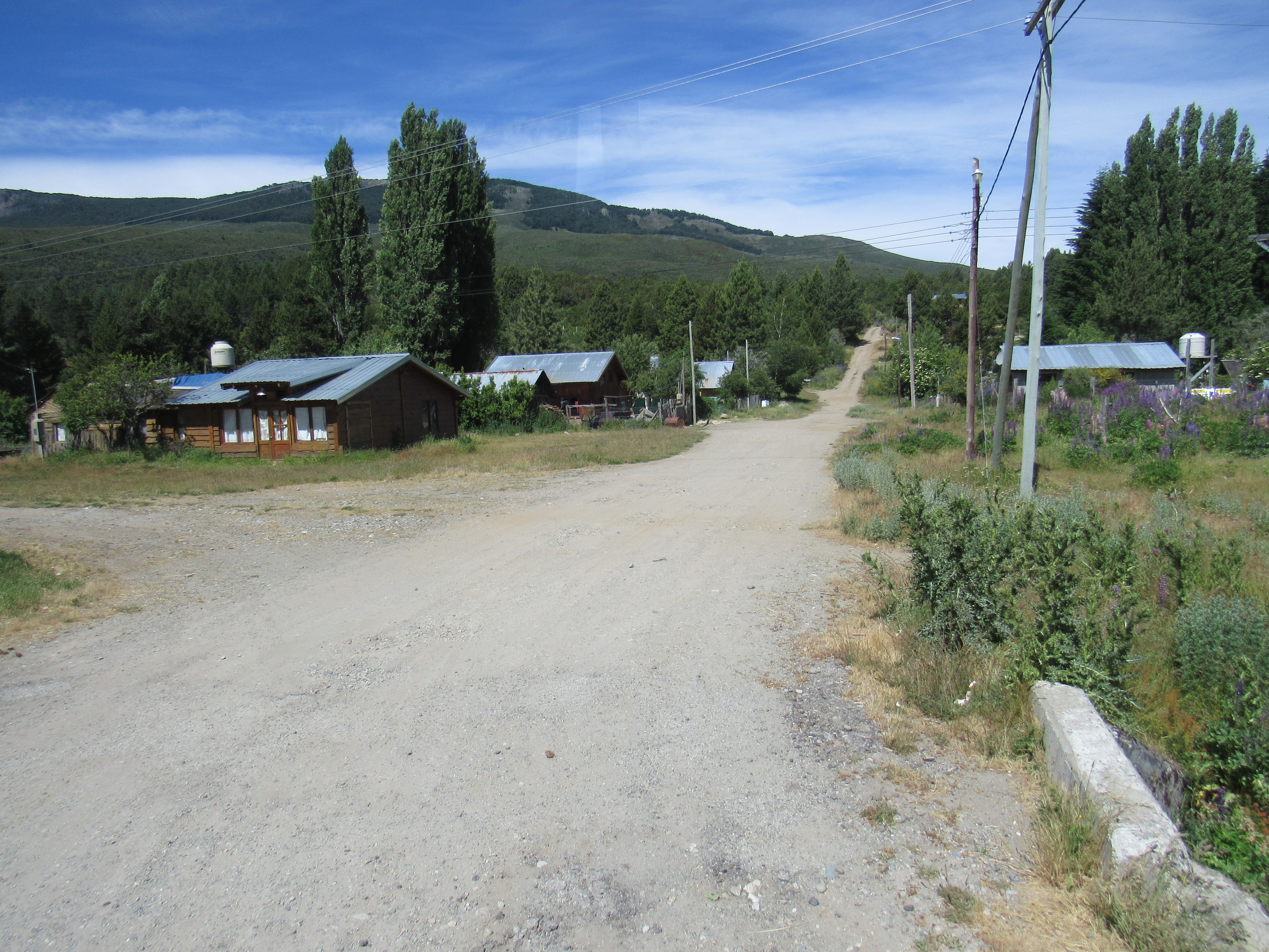 Calle en paraje El Foyel a la vera de la ruta 40